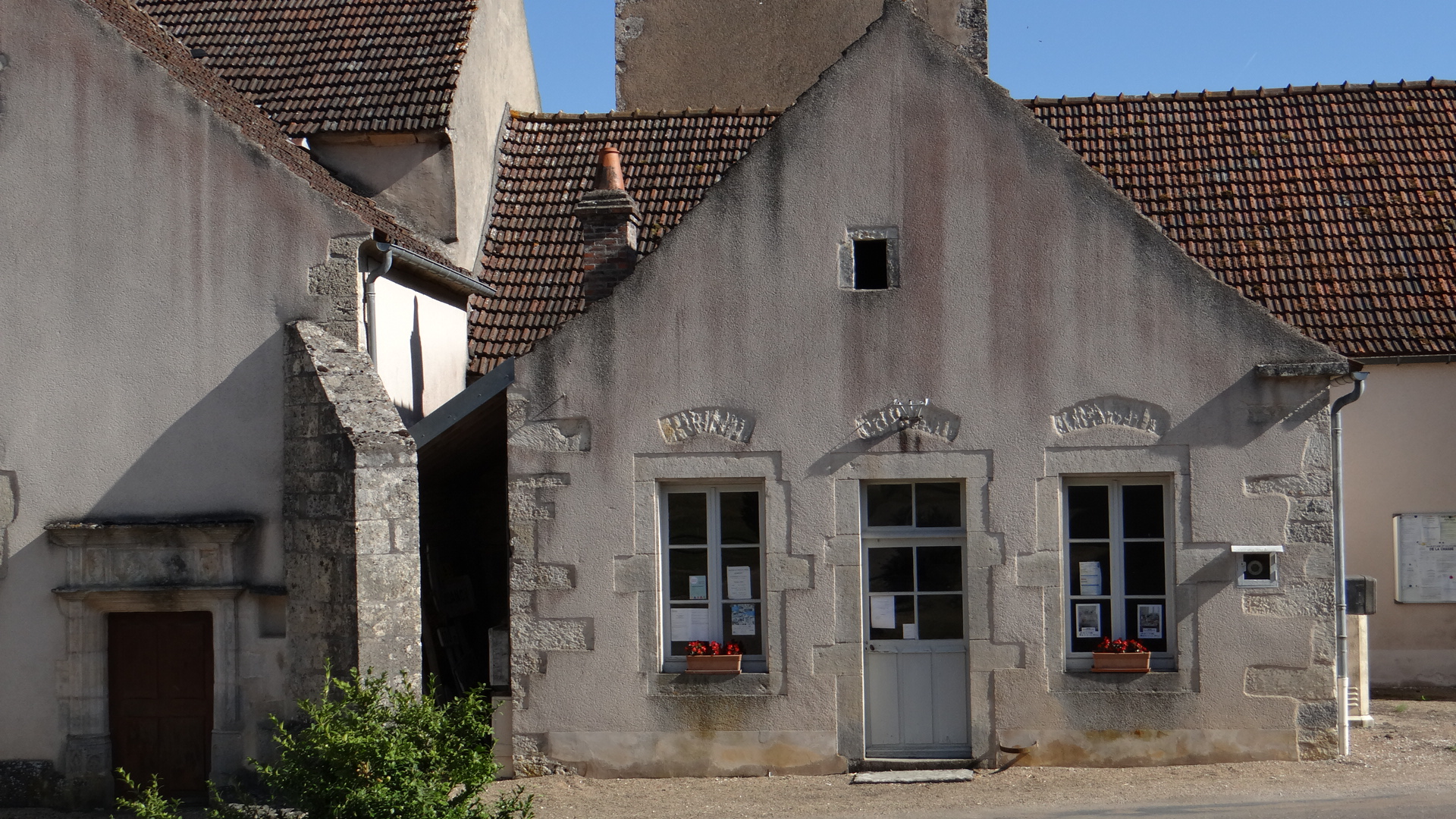 Mairie de Jouancy adossée à l'égkise